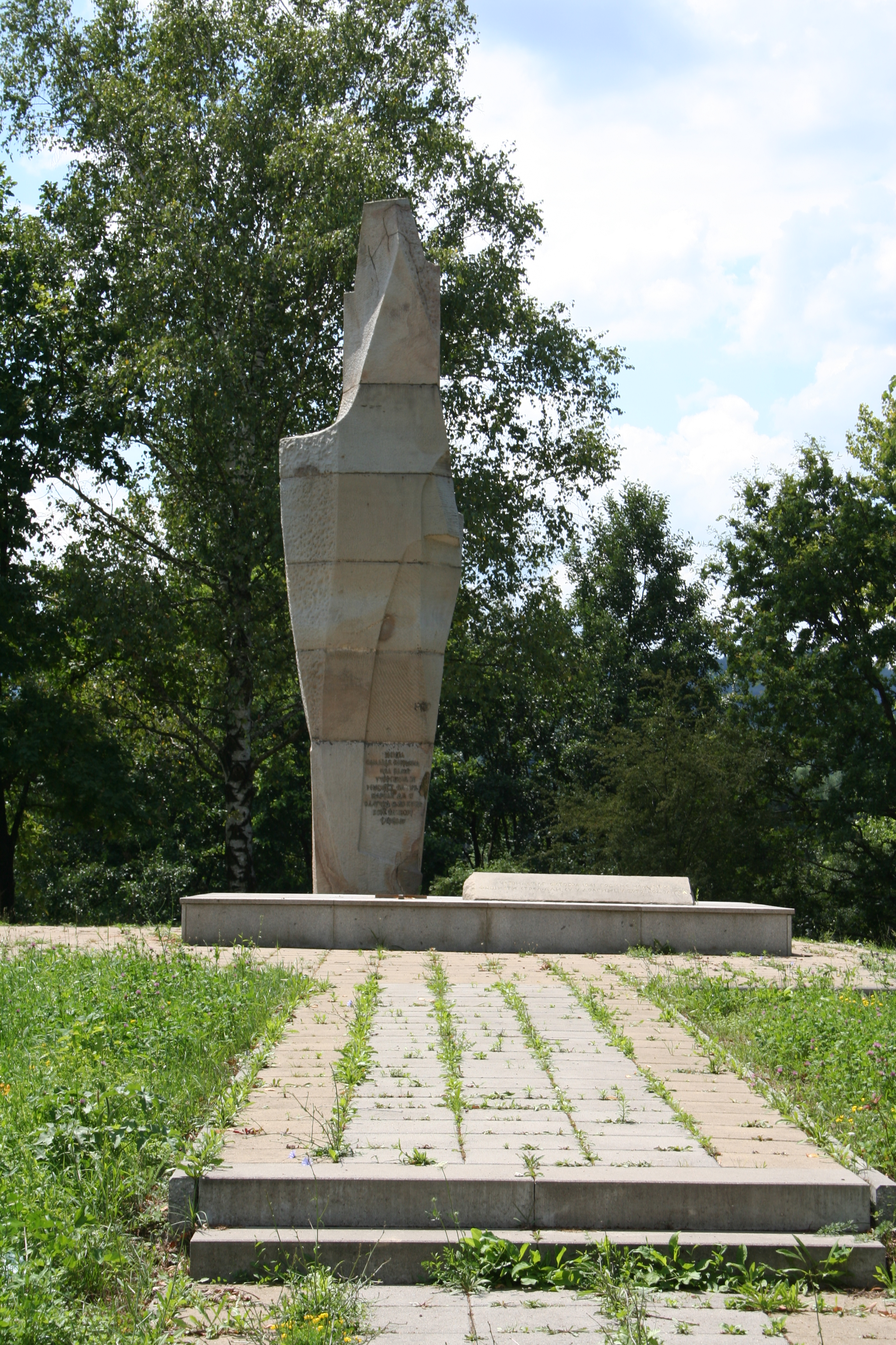 Spomenik i kosturnica, Draginac